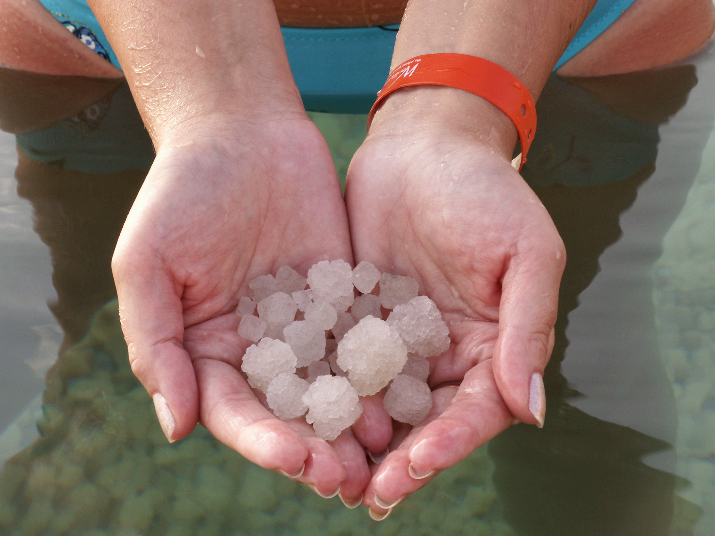 Такими кристаллами покрыто дно Мёртвого моря